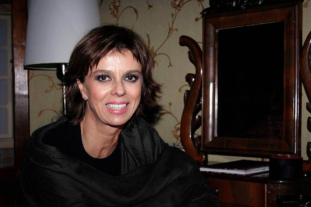 Elżbieta Zającówna - Teatr Bajka (Warszawa) - "Dzikie żądze" (Tarnobrzeg 11.12.2007).